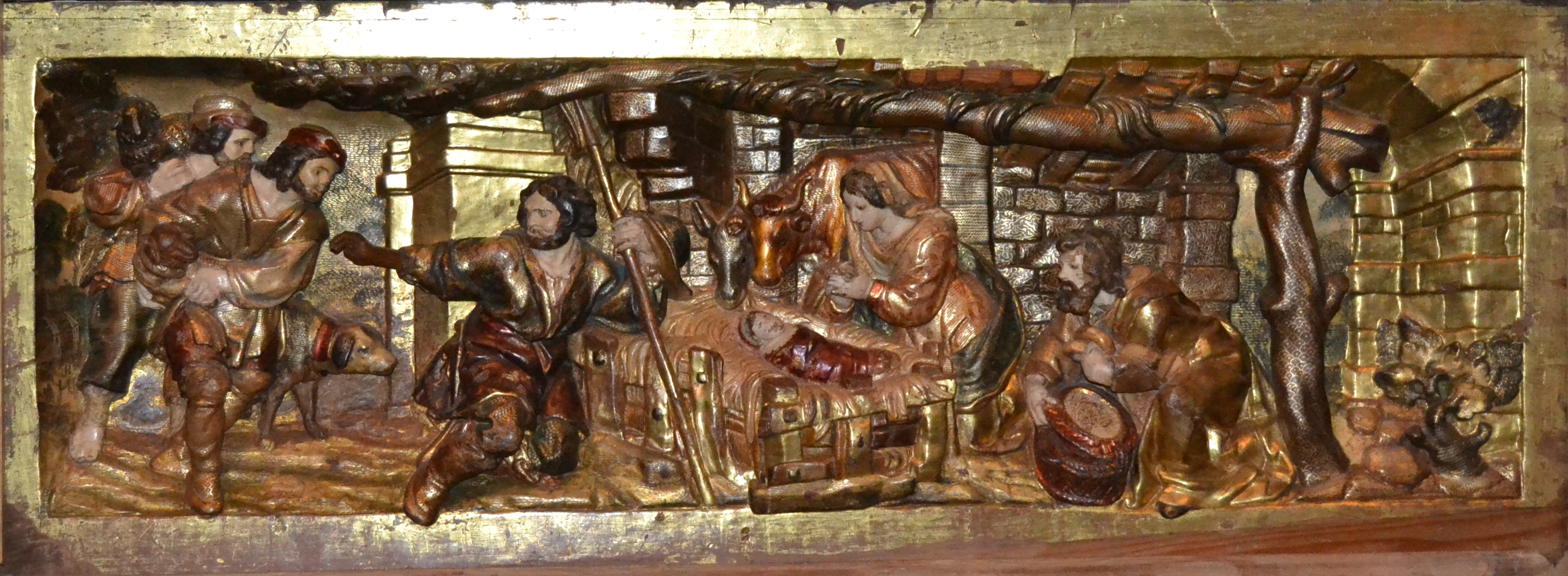 Policromía sobre relieve de madera del retablo de la Purísima de Santa María de Verdú.